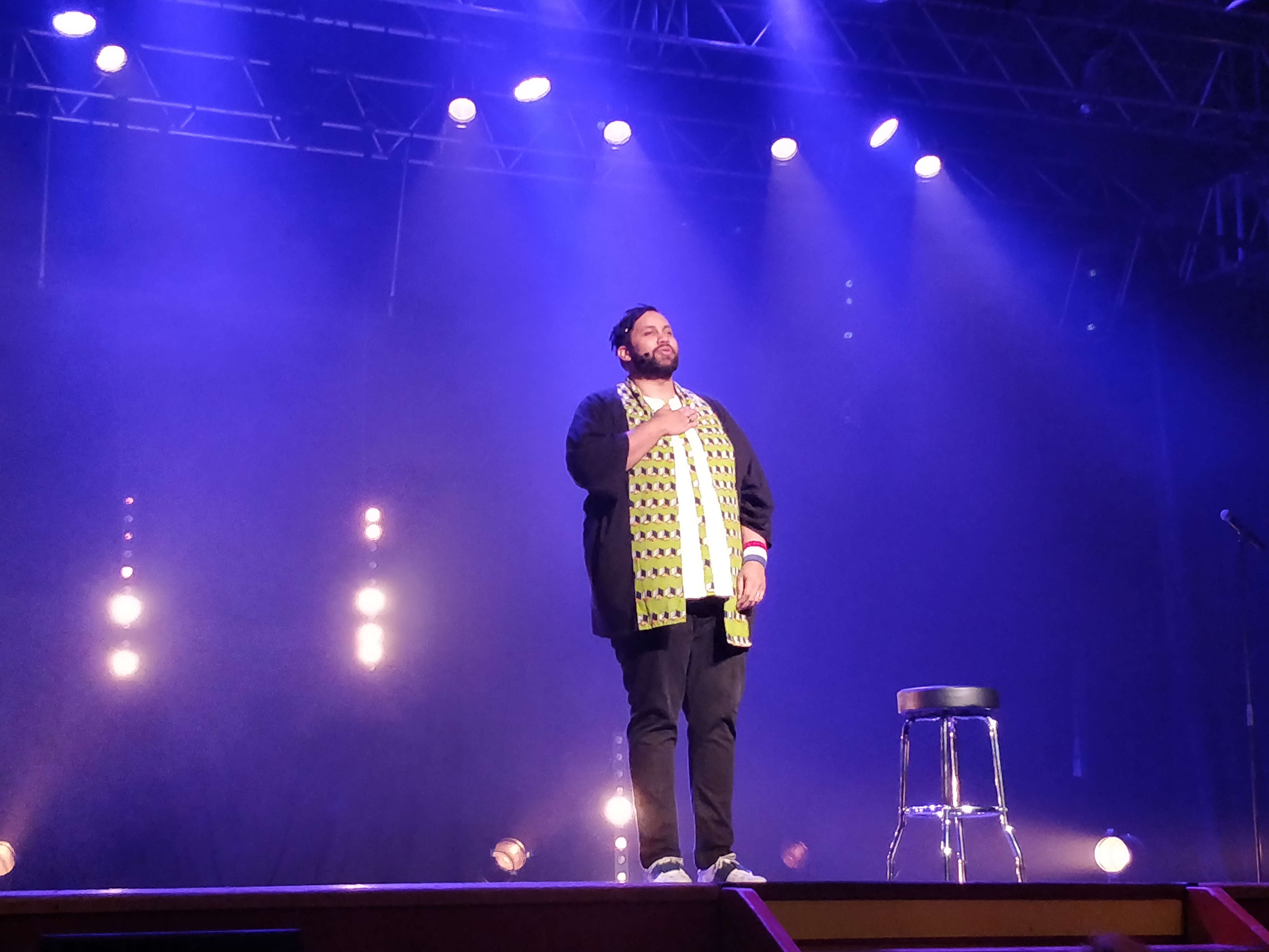 Kevin Razy, en spectacle à Wissous.